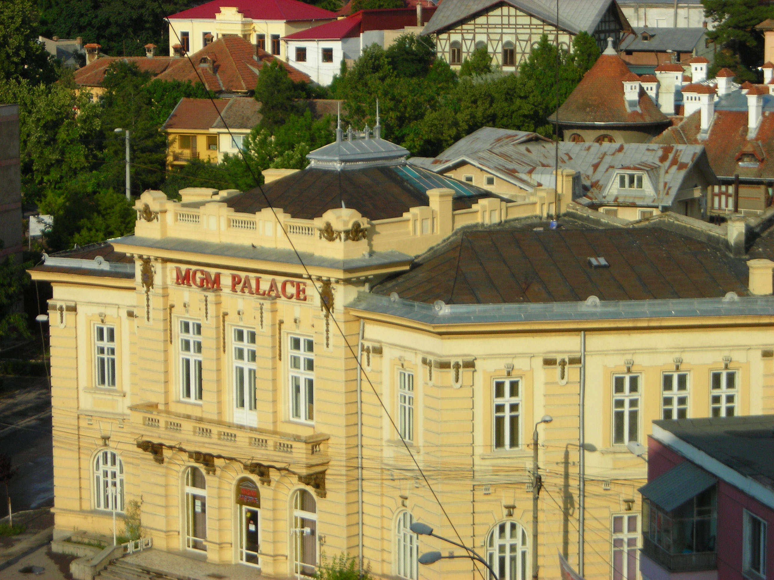 Fostul Sediu al Administrației Pescăriei Statului